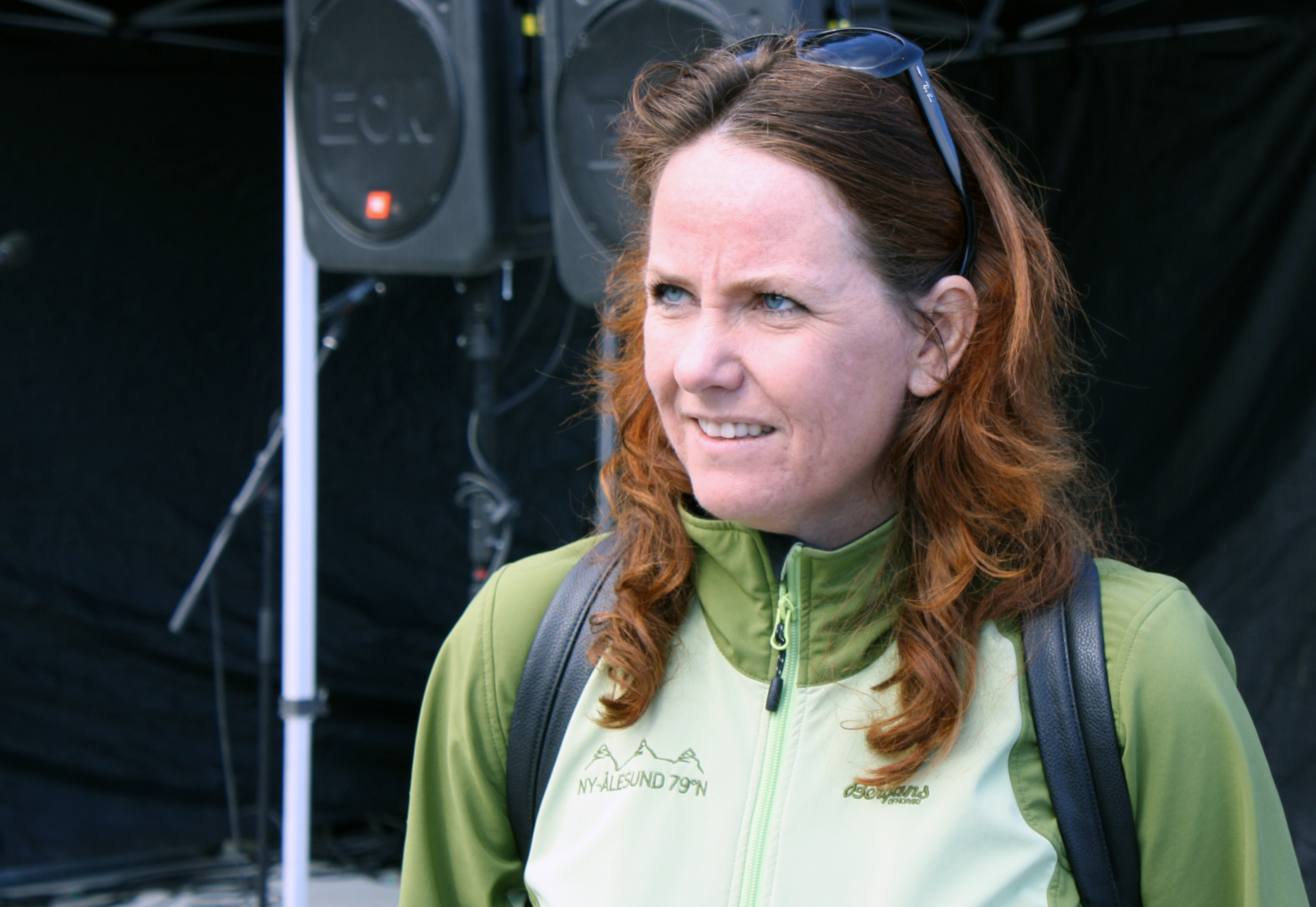 Statssekretær Heidi Sørensen i Miljøverndepartementet talte under åpningen av Killingdal-friområdet i Fagervika.